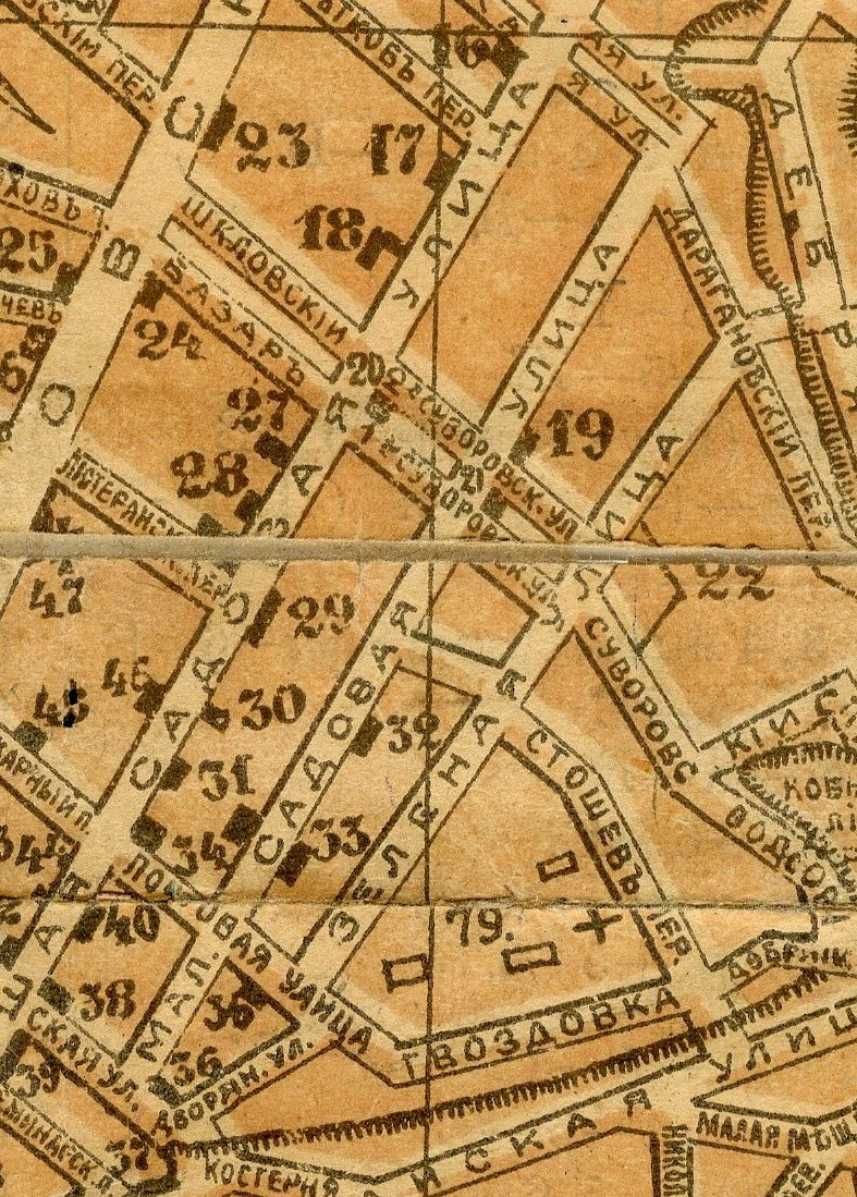 Беларуская (тарашкевіца): Магілёў (Магілёў). Плян места